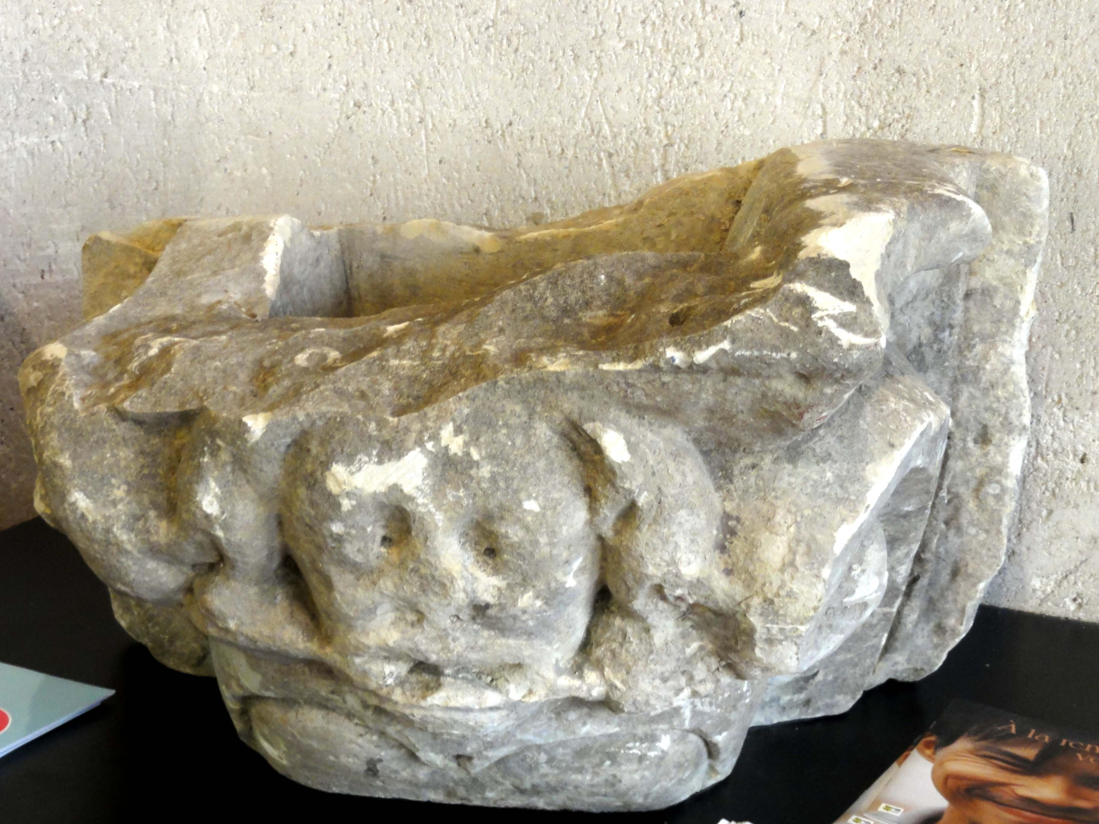 Ancien chapiteau, déposé dans la nef.